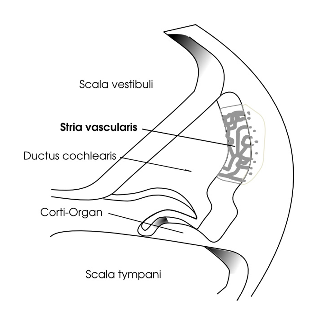 Stria vascularis, Schema der Cochlea